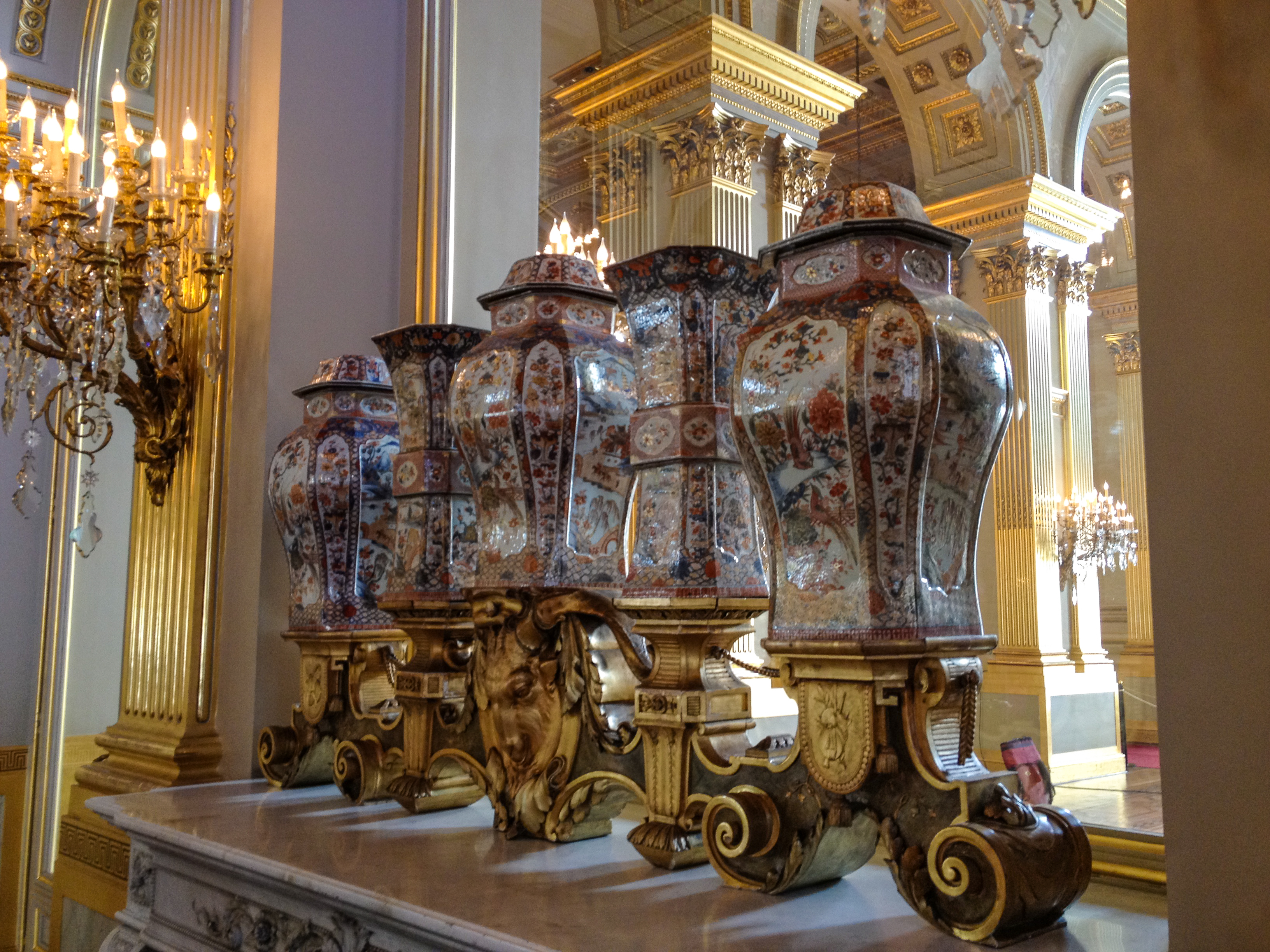 The Royal Palace of Brussels (Dutch: Koninklijk Paleis van Brussel